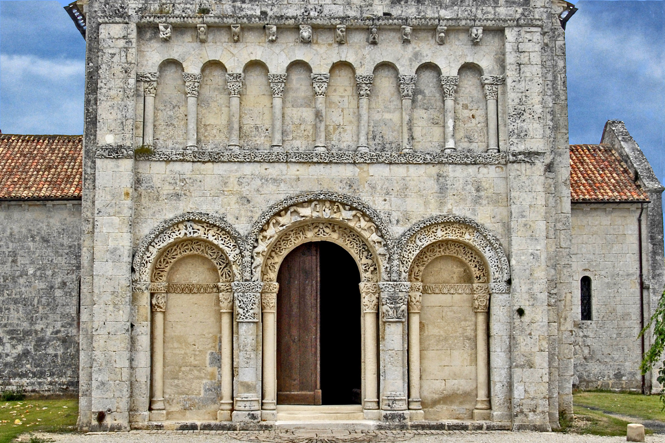 Noter-Dame Corme-Écluse, Fassade, Erd- und Obergeschoss